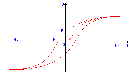 Creato da Vince 15:07, 23 mar 2006 (CET)Vince per Wikipedia. Rappresentazione del ciclo di isteresi nei materiali ferromagnetici.